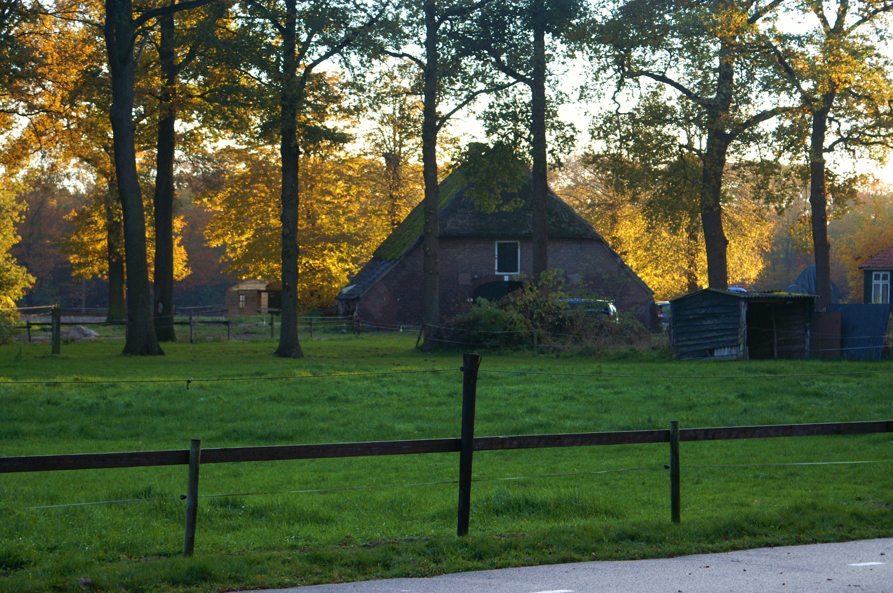 Boerderij aan de Vliertwijksestraat te Rosmalen.